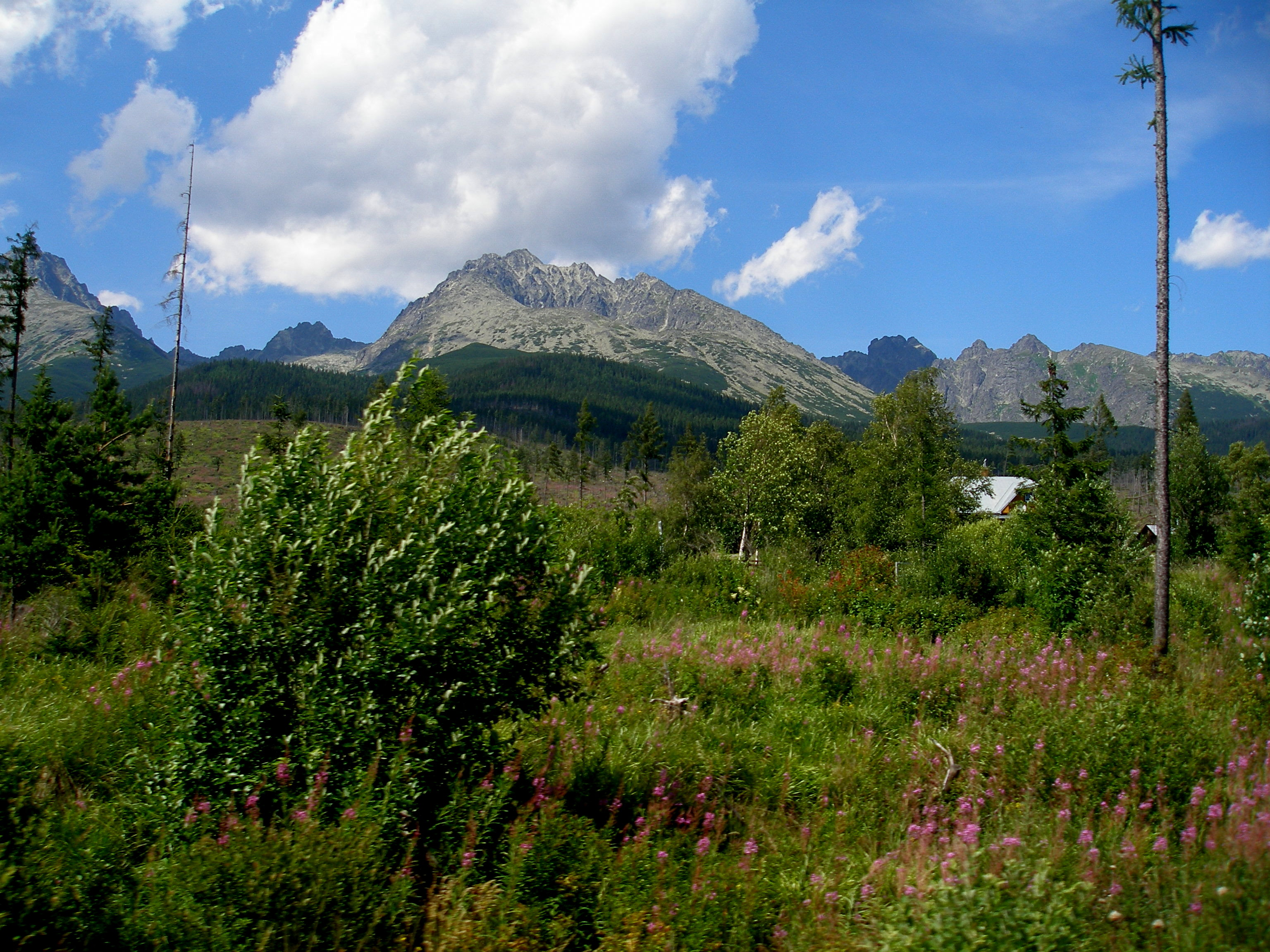 Tatranská osada Nová Polianka a okolie.